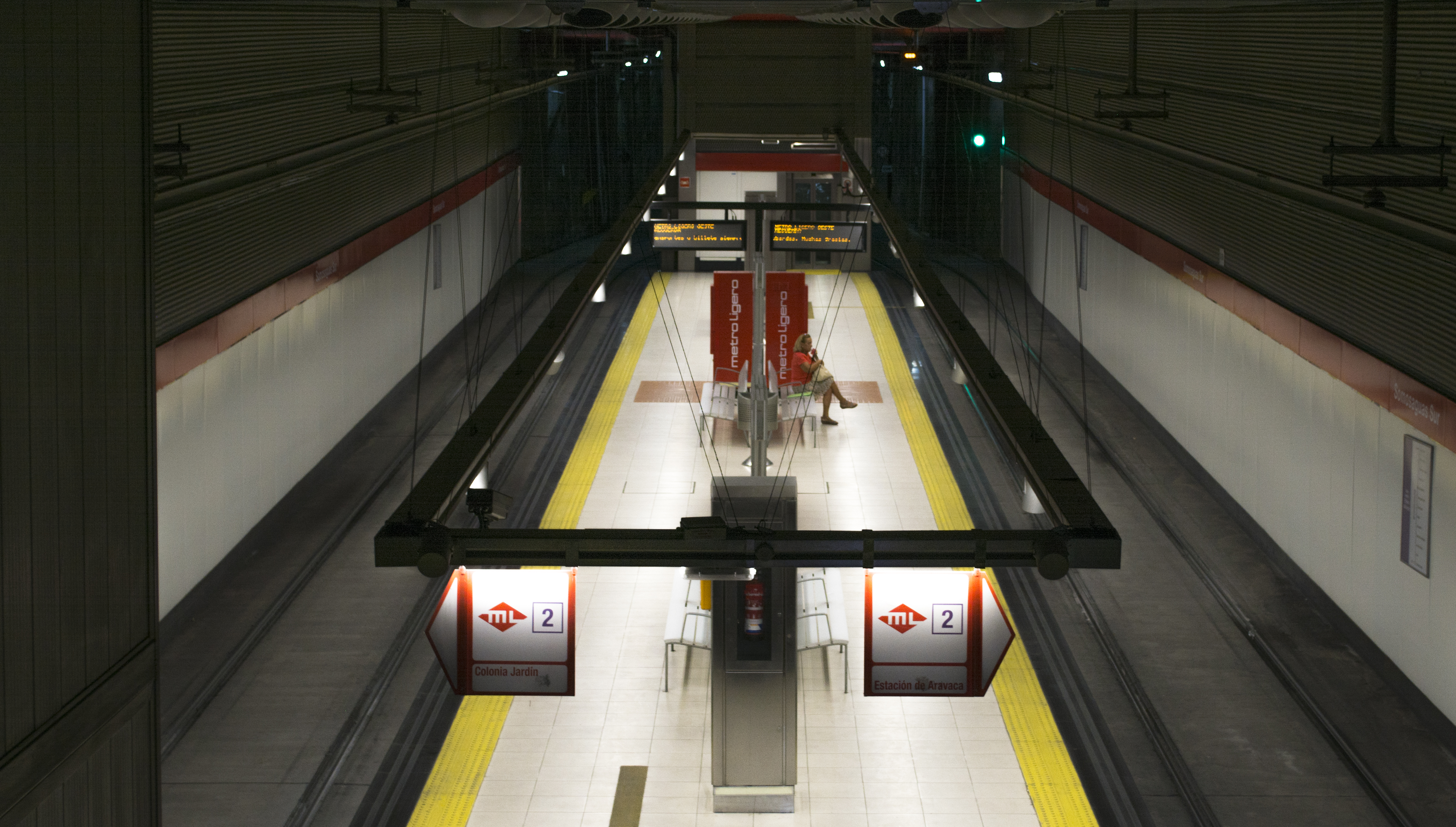 Andenes y vías de la estación Somosaguas Sur, de Metro Ligero Madrid, desde las escaleras de acceso.